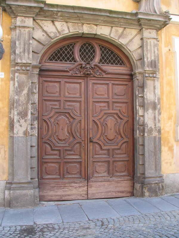 Asti, Palazzo Gazzelli. Foto fatta da me, Faberh 2006.